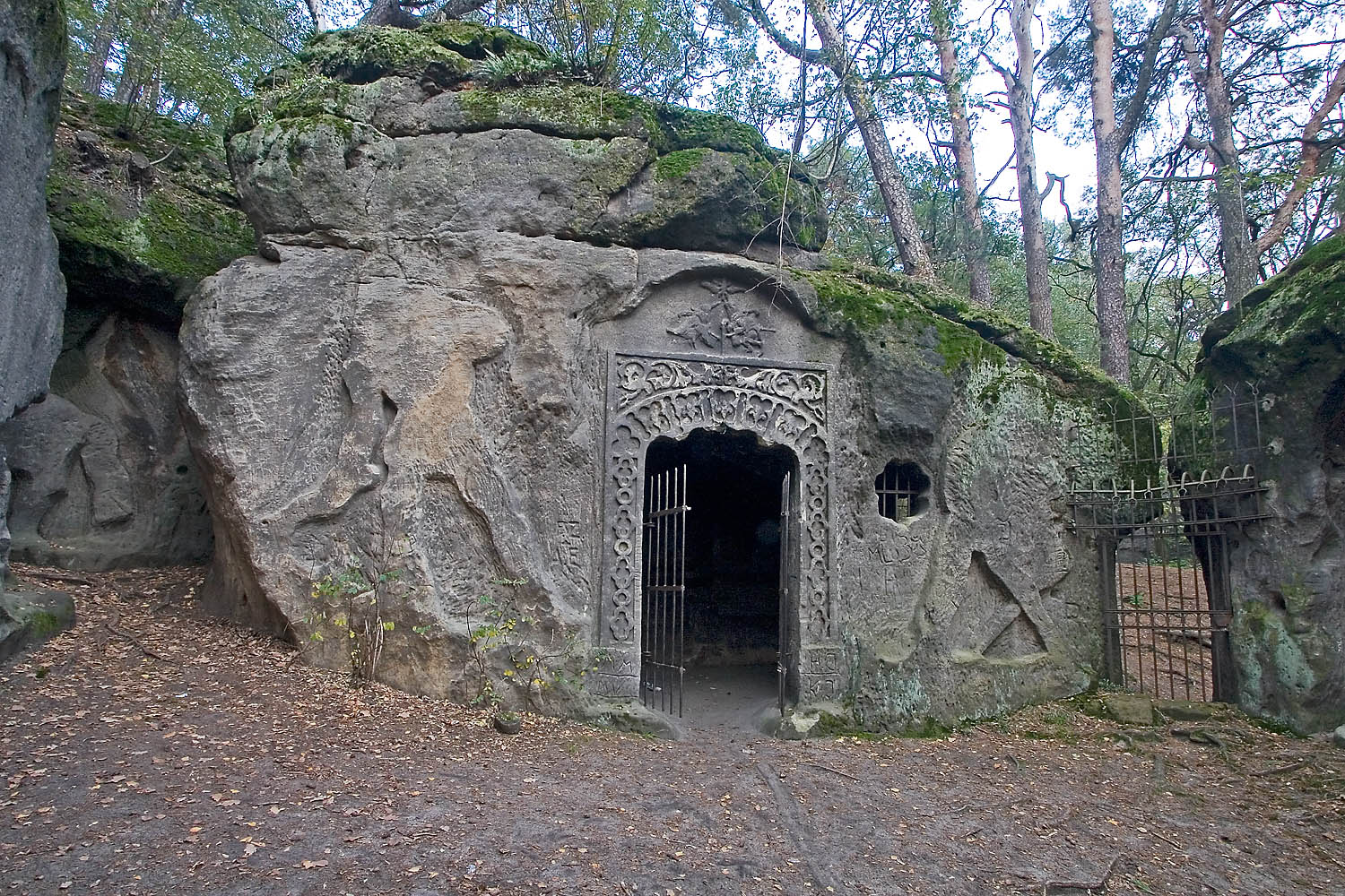 Pískovcové reliéfy v jeskyni Klácelka nad obcí Želízy